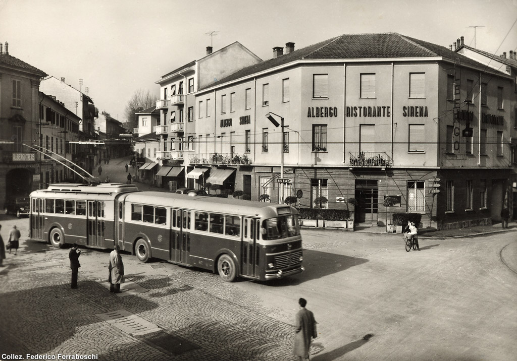 Rivoli, filosnodato Fiat 2405 Viberti, matricola F2, in partenza per Torino.